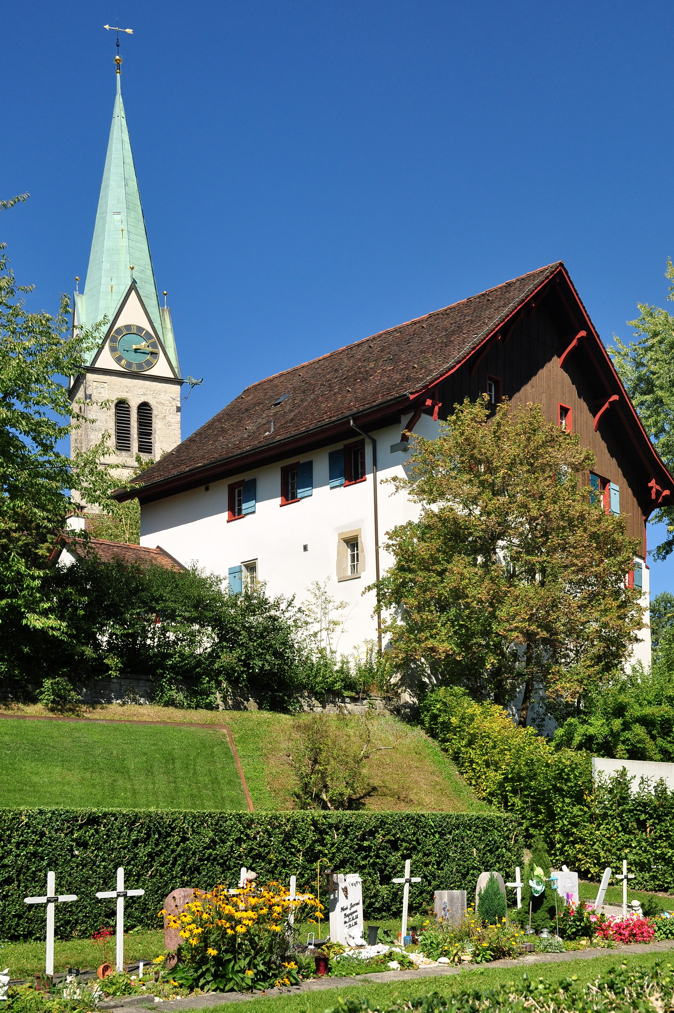 Reformierte Kirche St. Arbogast, Hohlandhaus, Hohlandstrasse 11 in Winterthur (Switzerland)